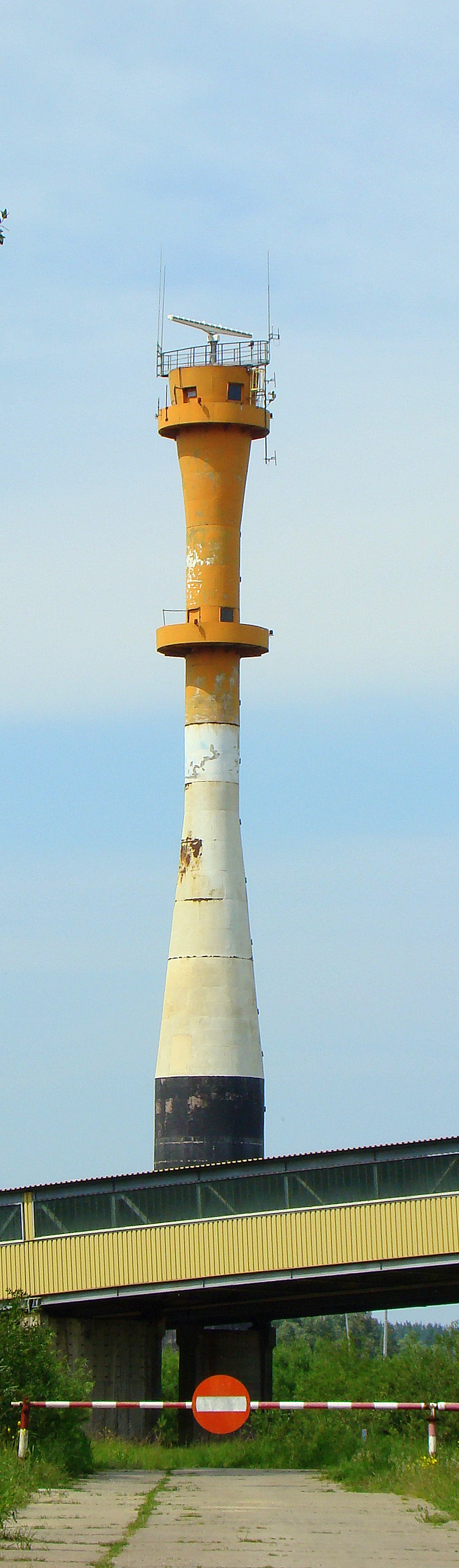 Port Police, (stawa), Województwo zachodniopomorskie, Polska